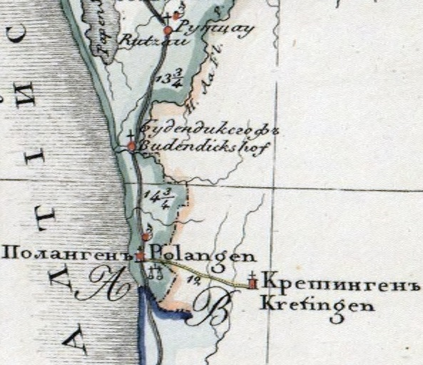 Grobiņas apriņķis (1820). Izgriezts no 1820 Курляндская Губерния.jpg